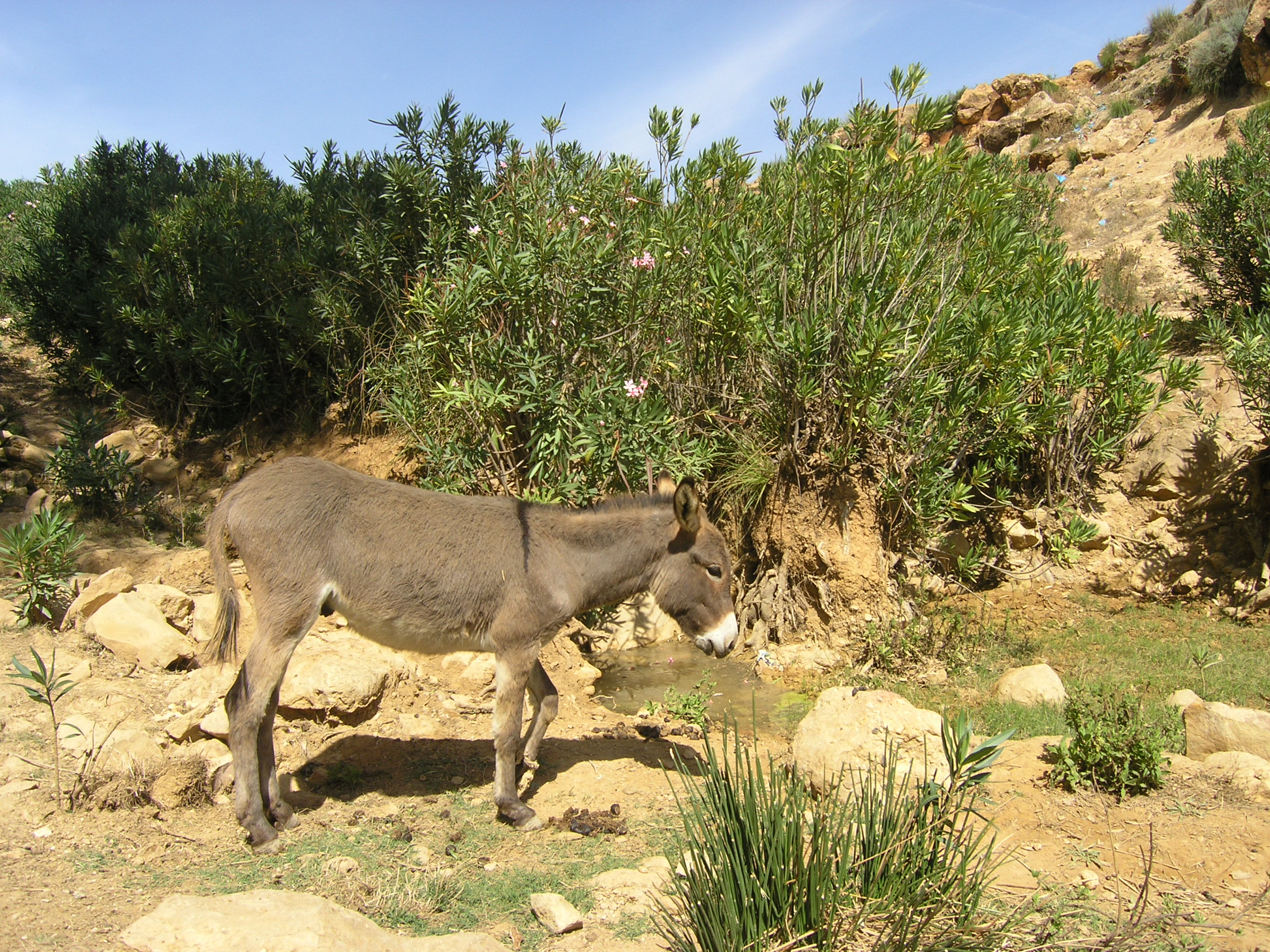 Fraguig - revolte des beni chougrane